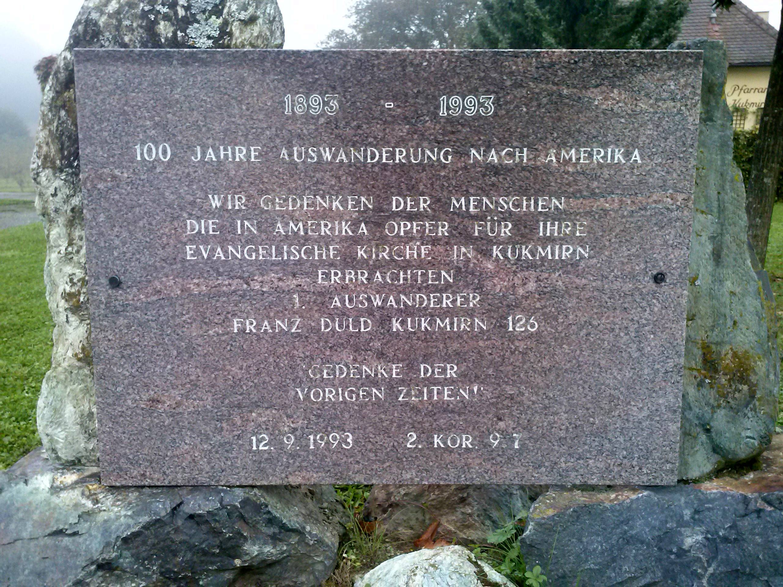 Denkmal bei der Evangelischen Kirche zu Ehren von Auswanderern nach Amerika.